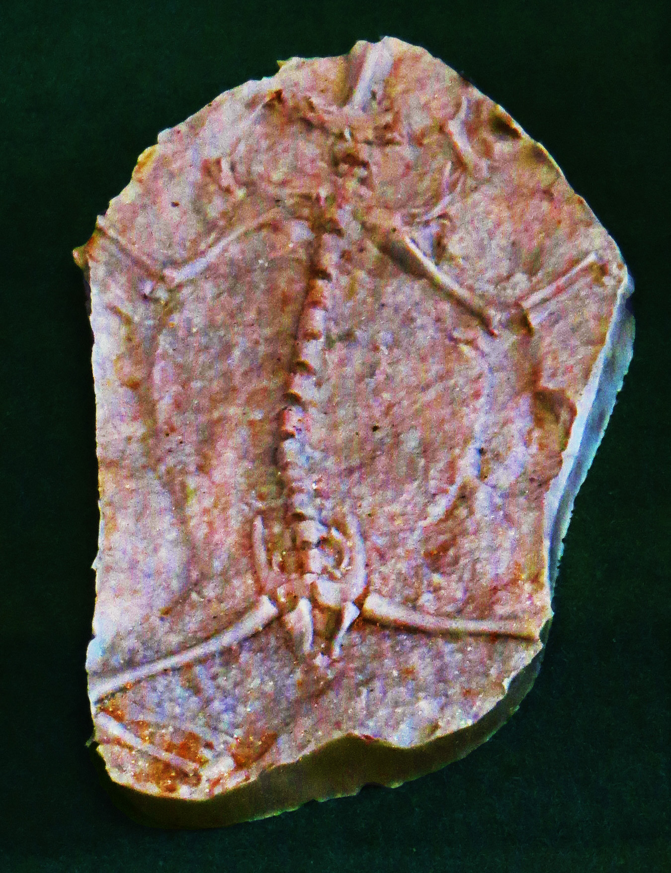 Fossil of Triadobatrachus, an extinct amphibian- Took the photo at Musee d'Histoire Naturelle, Paris